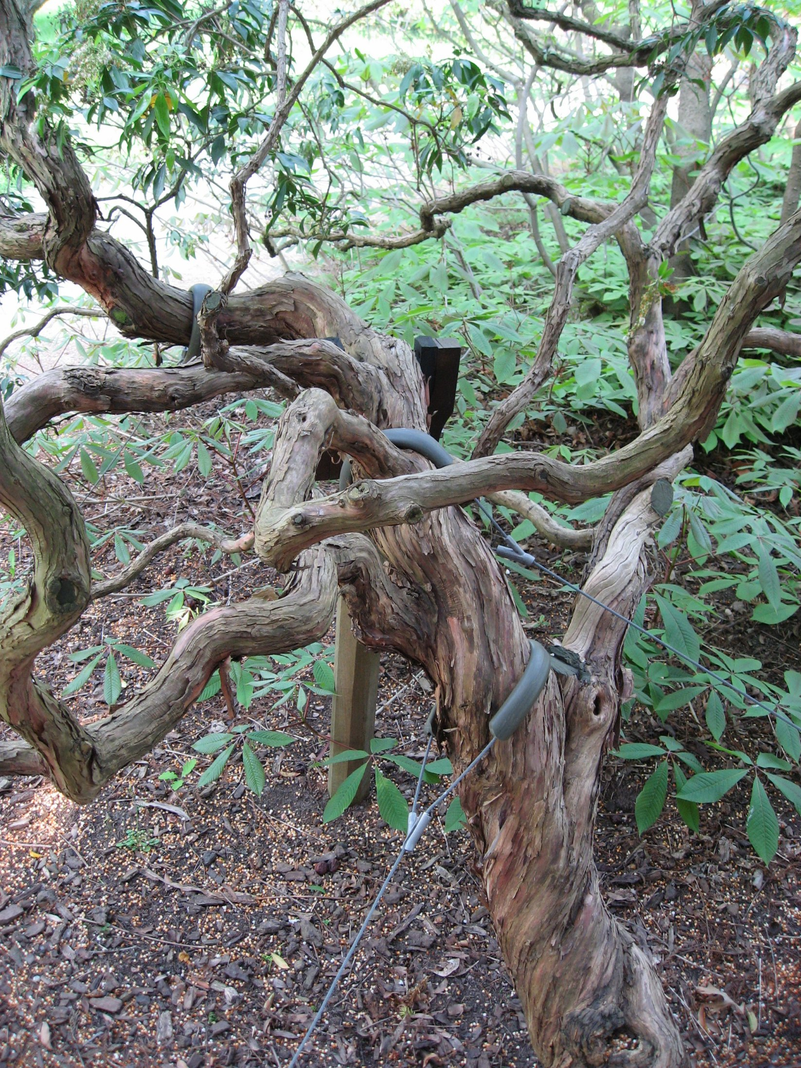 Pieris japonica (Thumb.) D.Don ex G.Don (Andromède du Japon) in Arboretum de la Vallée-aux-Loups Map: 48° 46' 22" N 2° 16' 5" E